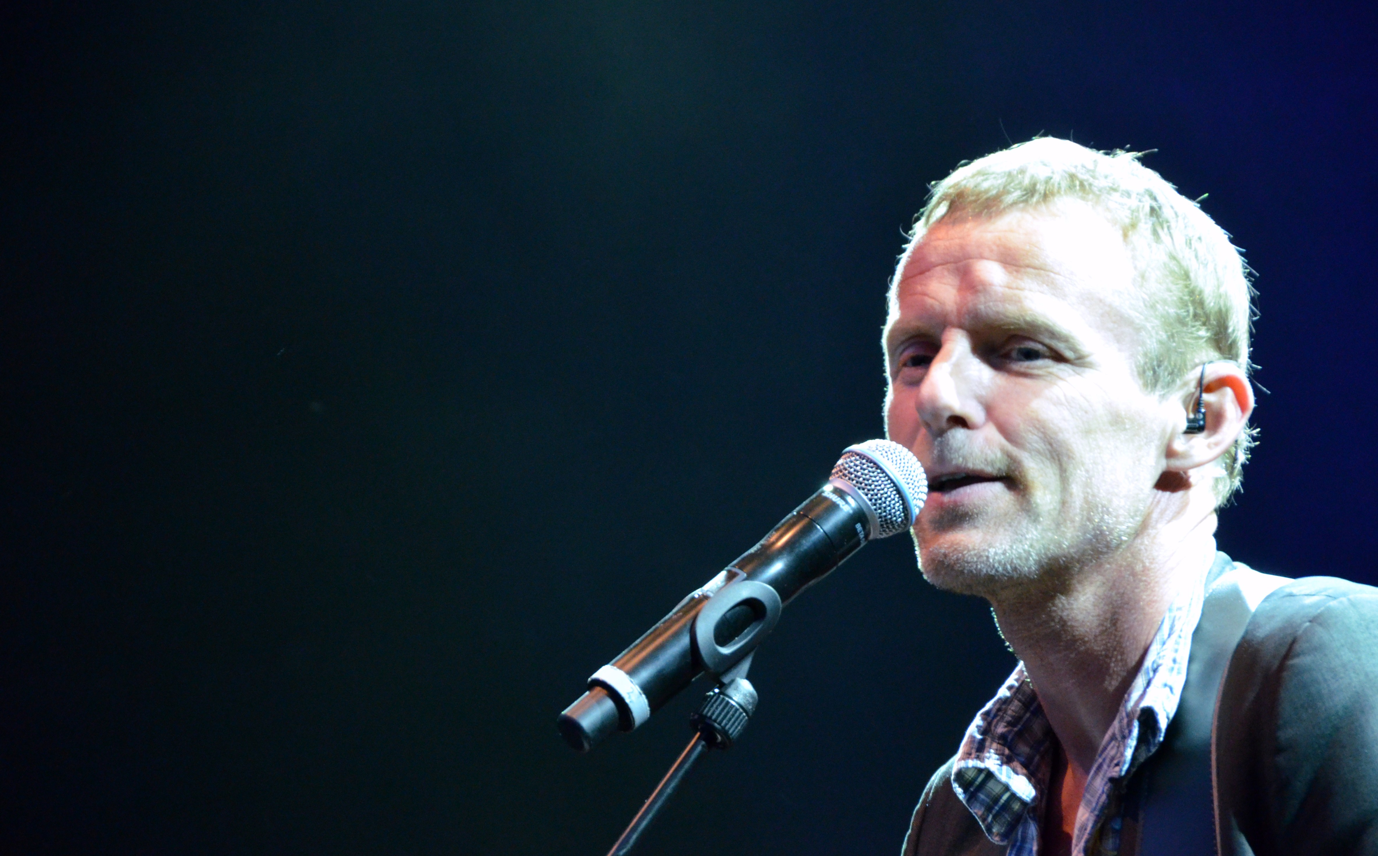 Di Derre (14)